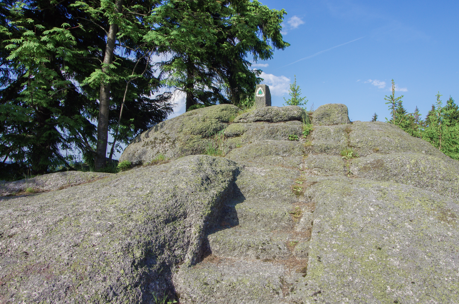 vrchol hory Špičák (990,8 m n.m.) u Přebuze, Krušné hory, nejvyšší hora okresu Sokolov